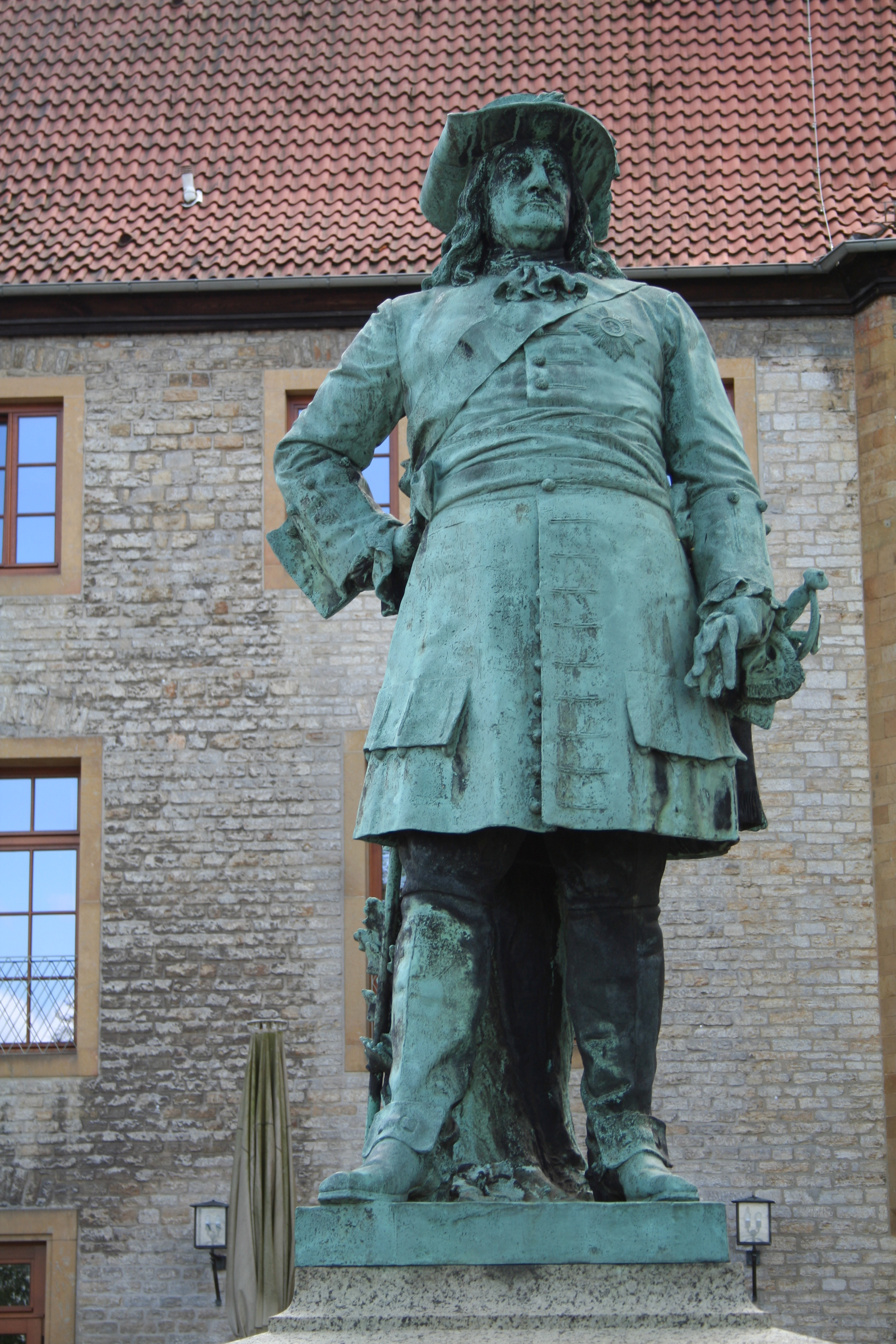 Denkmal des Großen Kurfürsten auf der Sparrenburg in Nahaufnahme.